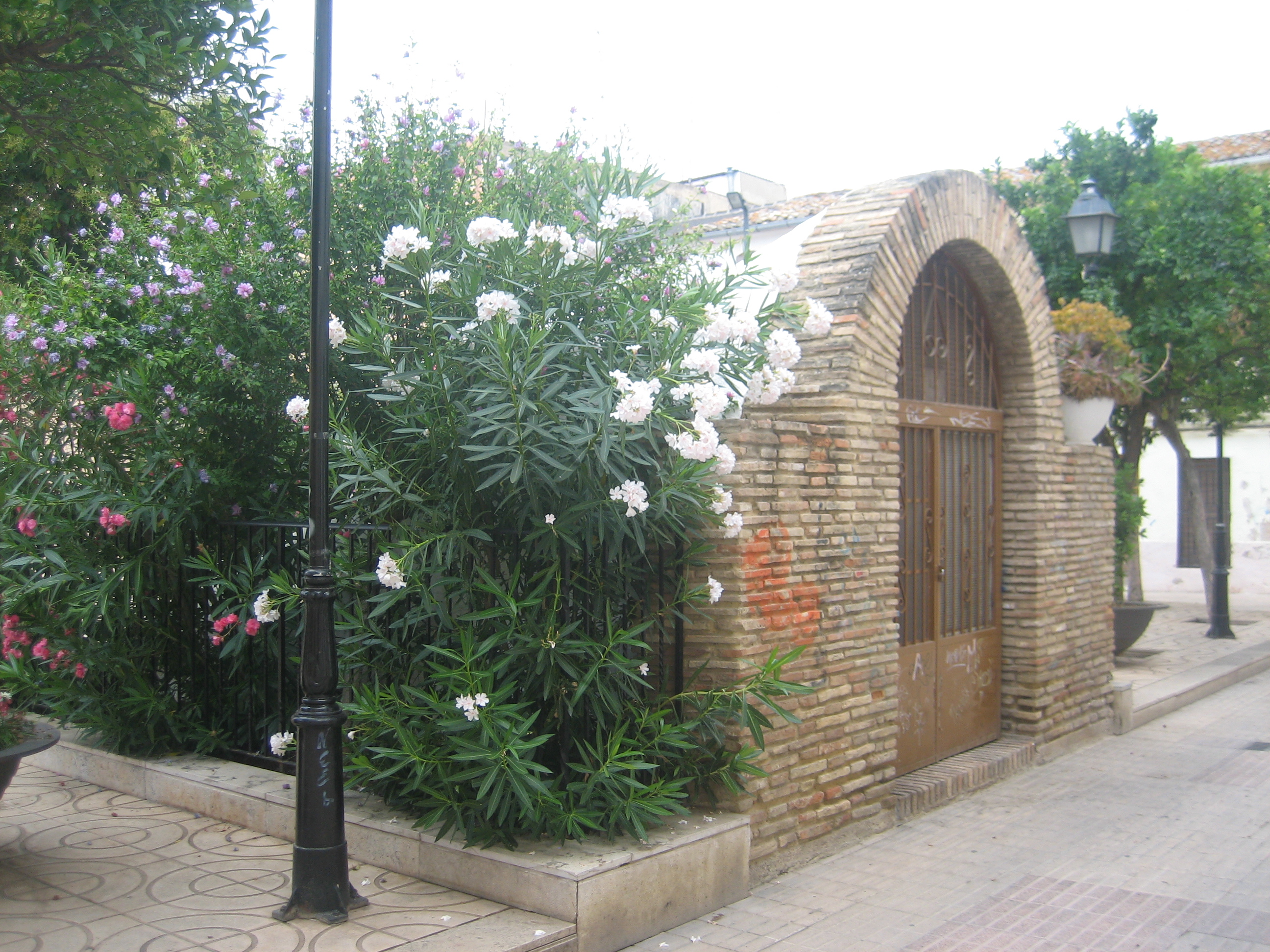 Entrada a la cisterna àrab de Quart de Poblet, a la província de València